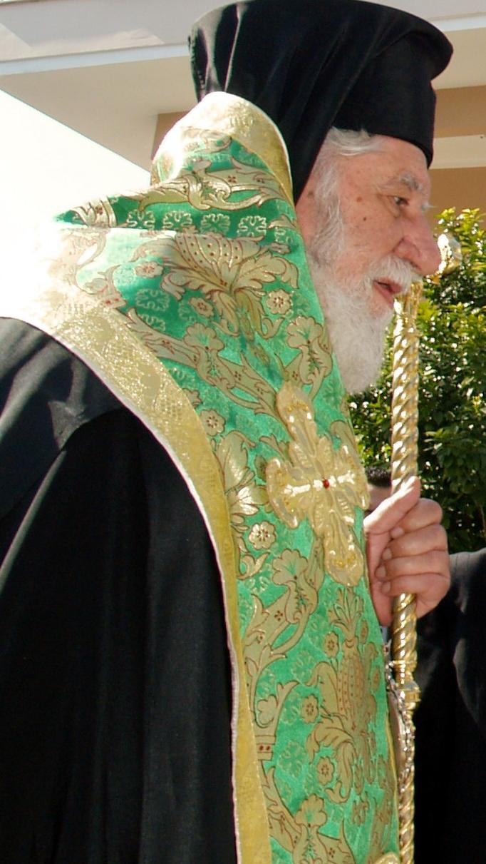 Μητροπολίτης Περιστερίου Χρυσόστομος Ζαφείρης